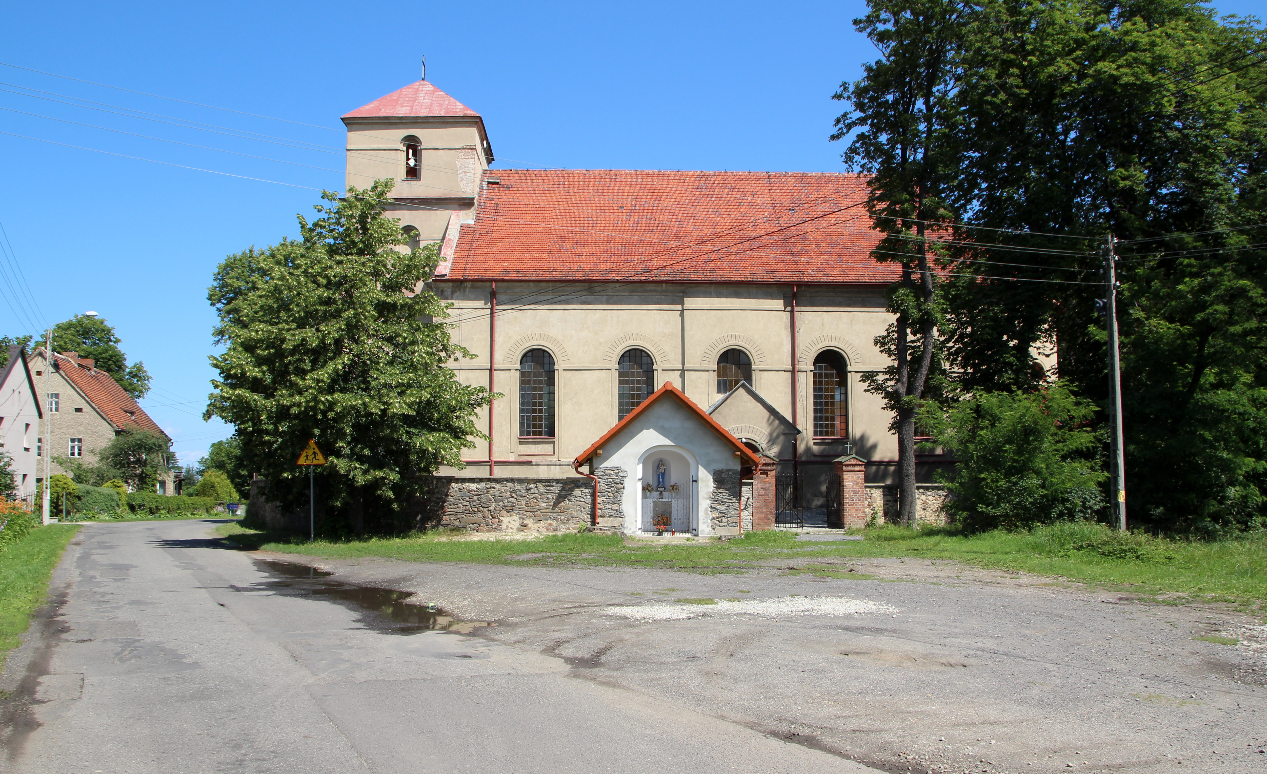 Nowy Las 35 - rzymskokatolicki kościół parafialny p.w. św. Jadwigi Śląskiej, 1823, 1949.